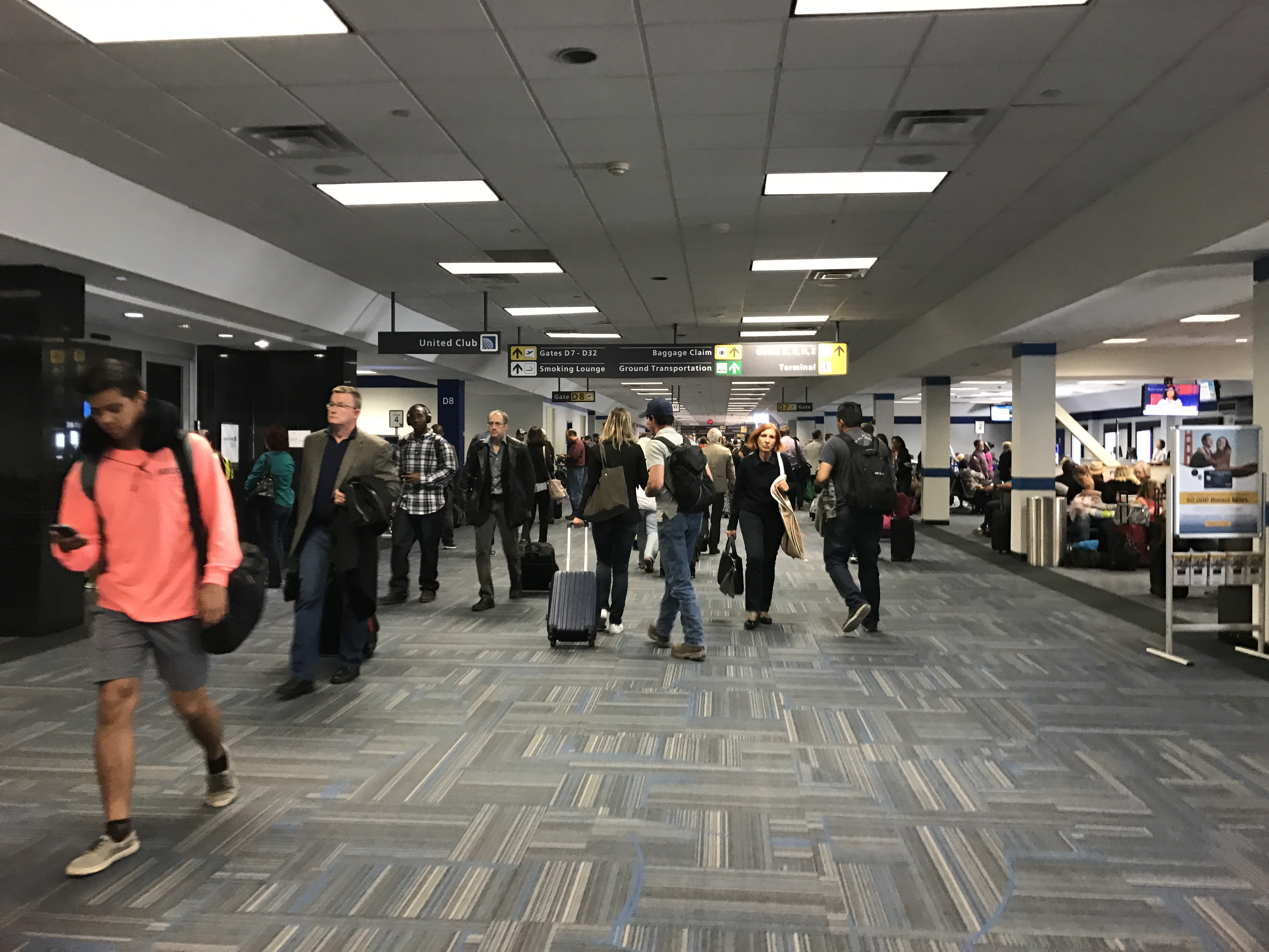 Sala D del Aeropuerto Internacional de Washington Dulles.